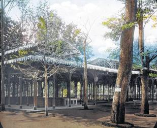 Foto (vor 1909) der 1842 von Friedrich von Gärtner errichteten gusseisernen Brunnenhalle in Bad Kissingen